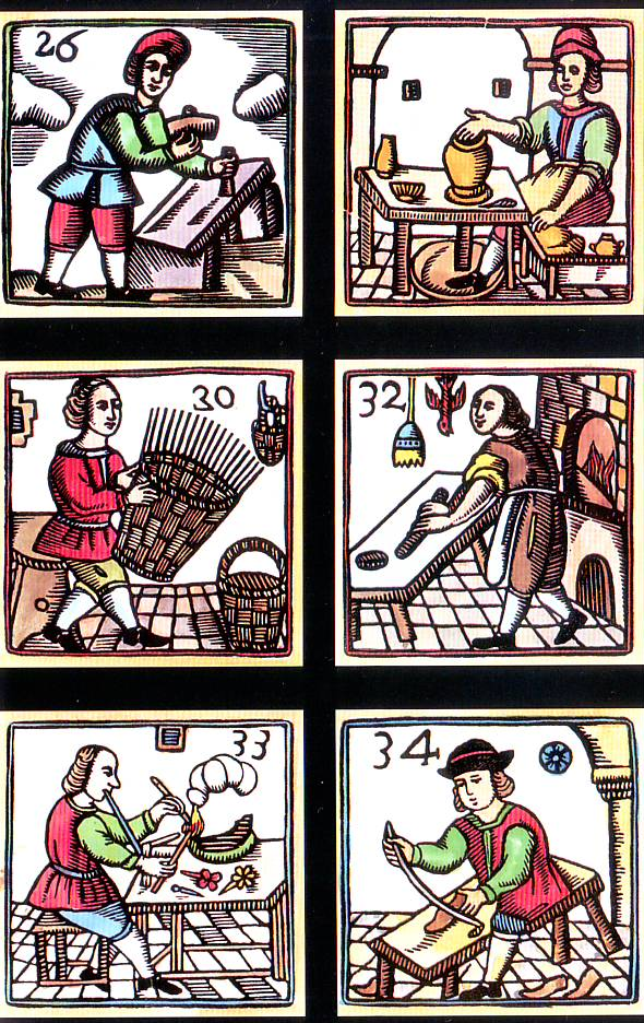 Panel con seis azulejos numerados de la serie de oficios gremiales: canteros, alfareros, mimbreros (cestería), panaderos, boteros y zapateros. Series de azulejería popular catalana a partir de originales de diseños anónimos desde el siglo XVII. [ Els rajoles dels oficis ; Museos de Arte de Barcelona (boletín en catalán) ; páginas 193-200